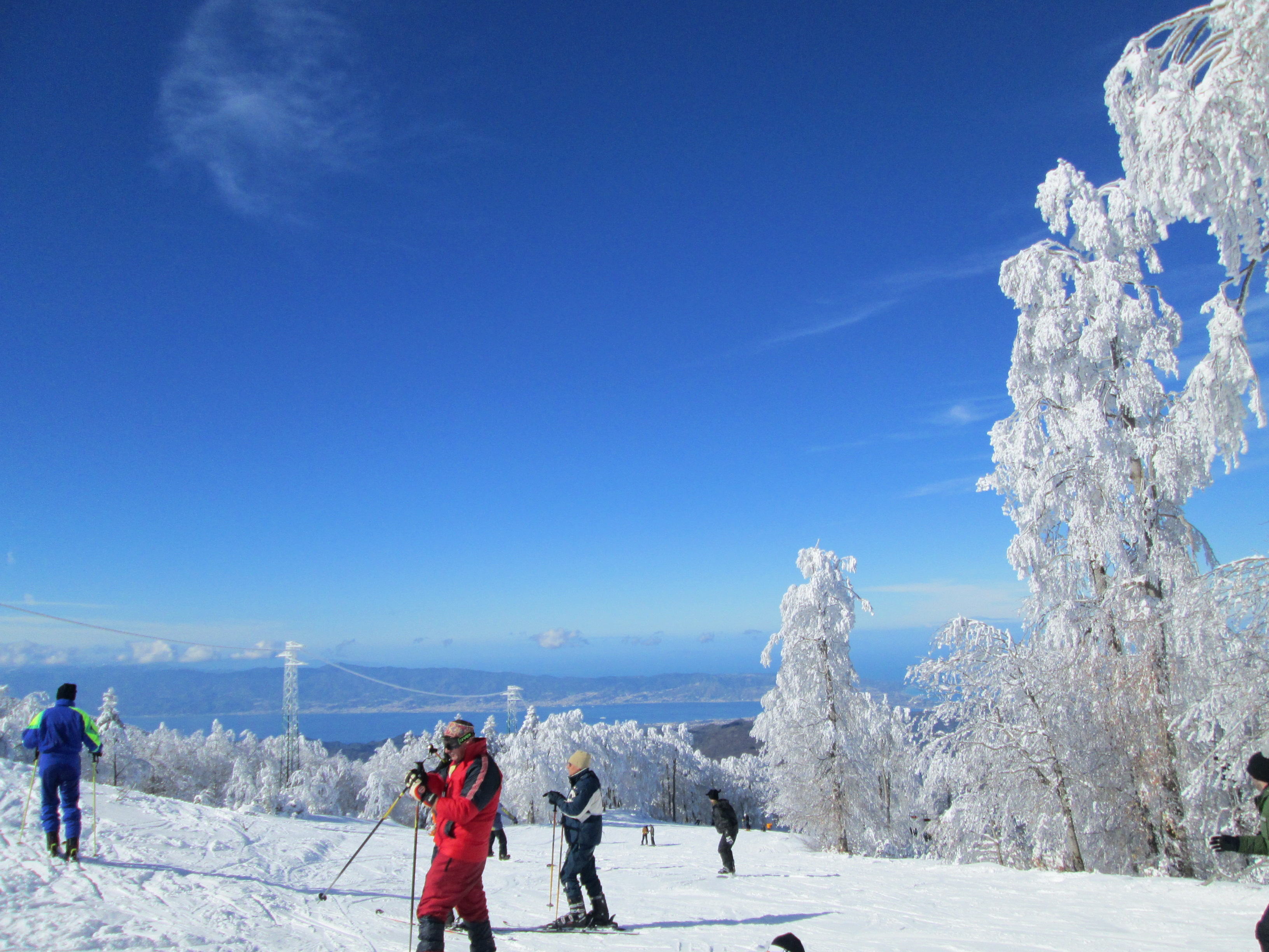 Gambarie, sciare guardando il mare.